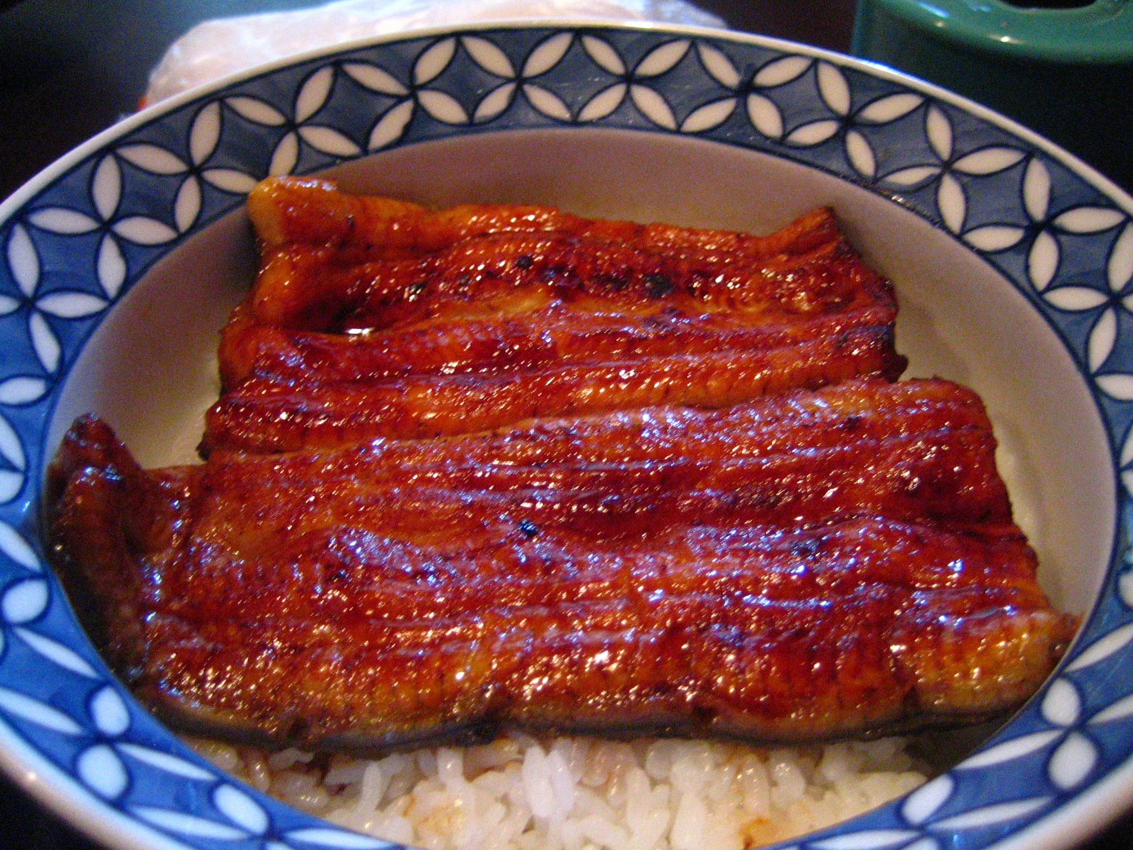 at "Miyagawa Honten", a traditional unagi restaurant in Tsukiji, Tokyo.